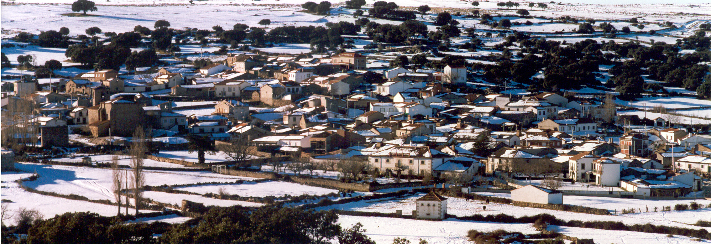 Pascualcobo nevado